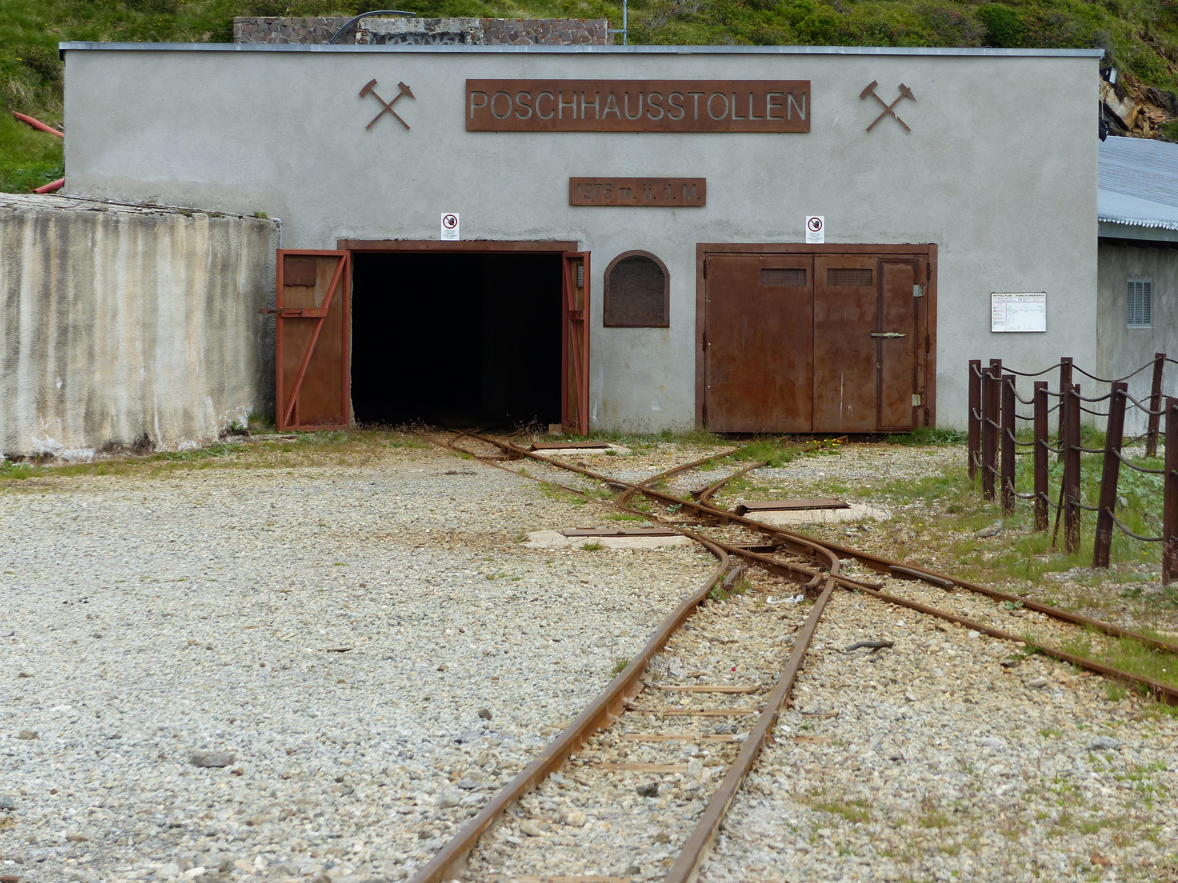 Bergbaumuseum Schneeberg: Eingang zum Poschhausstollen im oberen Lazzacher Tal